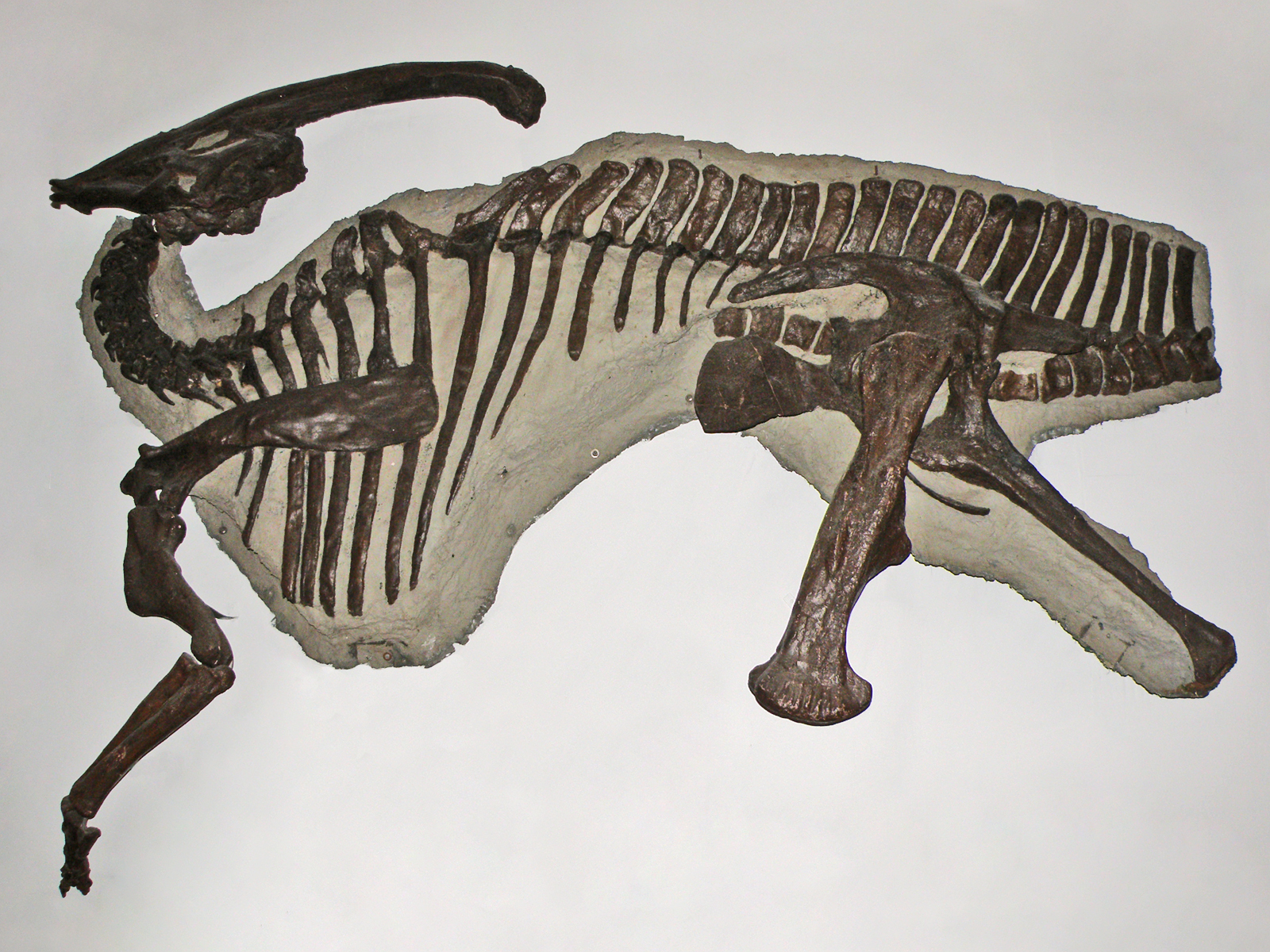 Muzeum Ewolucji Instytutu Paleobiologii PAN - Parasaurolophus walkeri (odlew szkieletu)